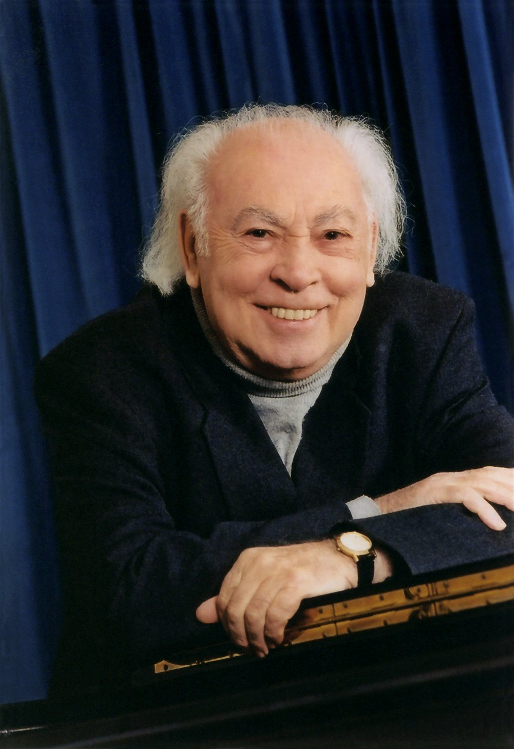 Porträt des deutschen Komponisten Adolph Kurt Böhm, Murnau/Staffelsee